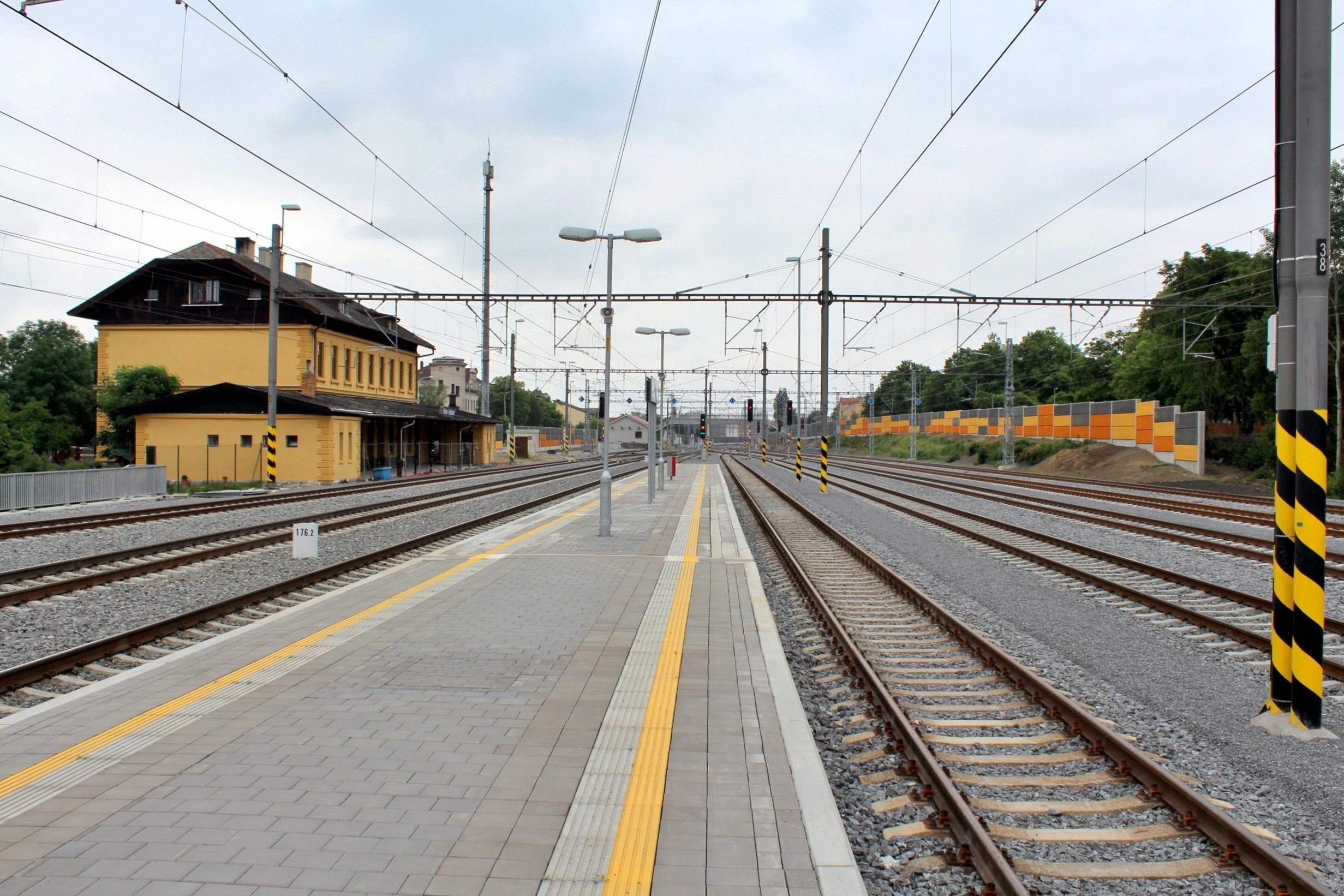 Nádraží Praha-Hostivař